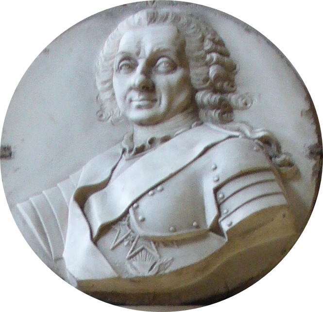 Chevert.